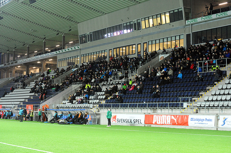 a_62_0380